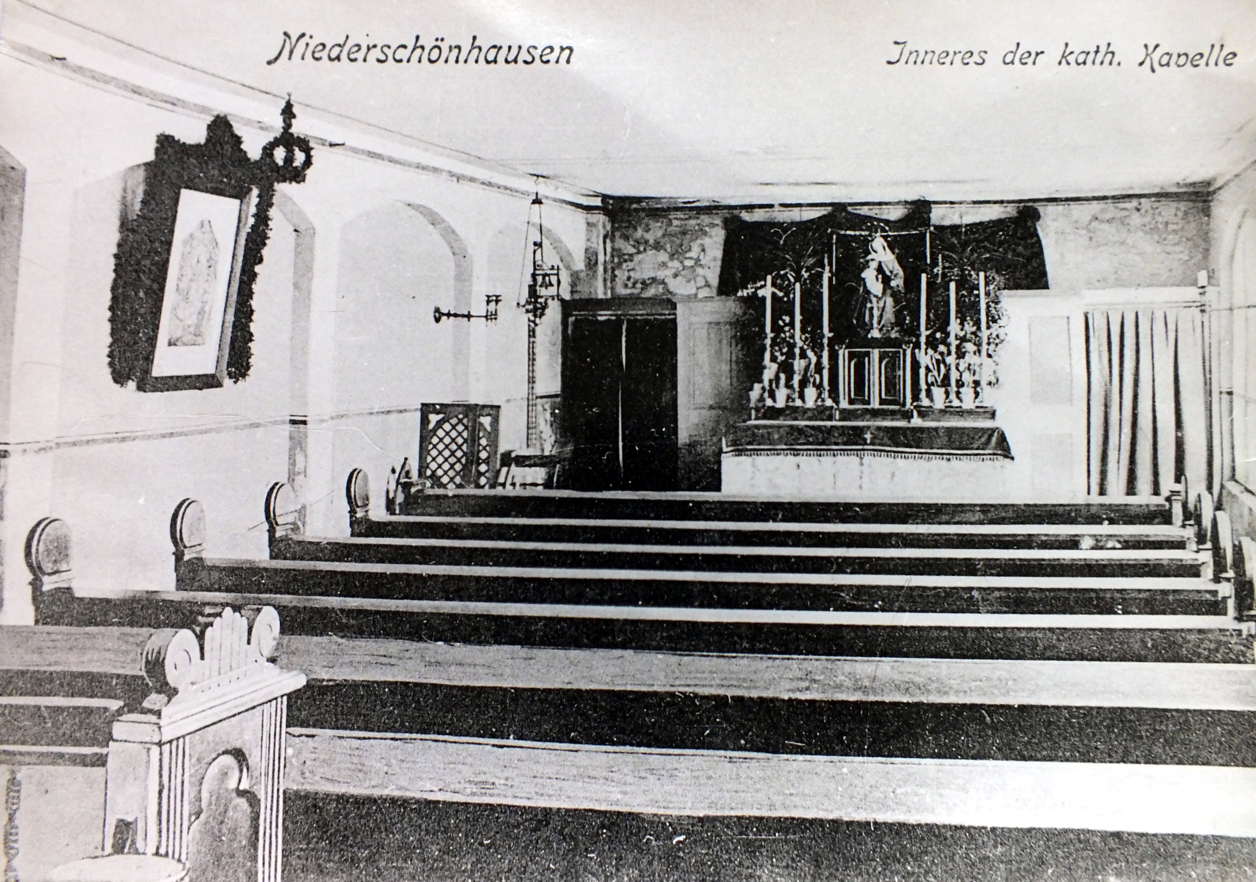 kathol. Kirche Maria Magdalena, Niederschönhausen; die Vorgängerkapelle